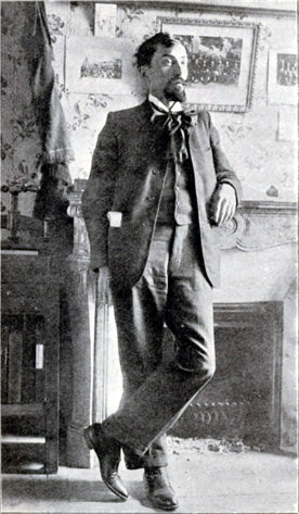 Victor Griffuelhes, né à Nérac (Lot-et-Garonne) le 14 mars 1874 et mort le 30 juin 1922 (à 48 ans) à Saclas (Seine-et-Oise), est un syndicaliste révolutionnaire et libertaire français.